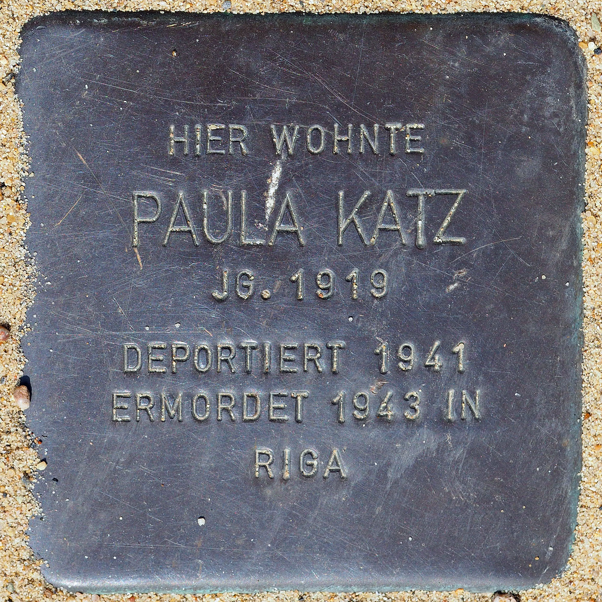 Stolpersteine GV: Katz, Paula